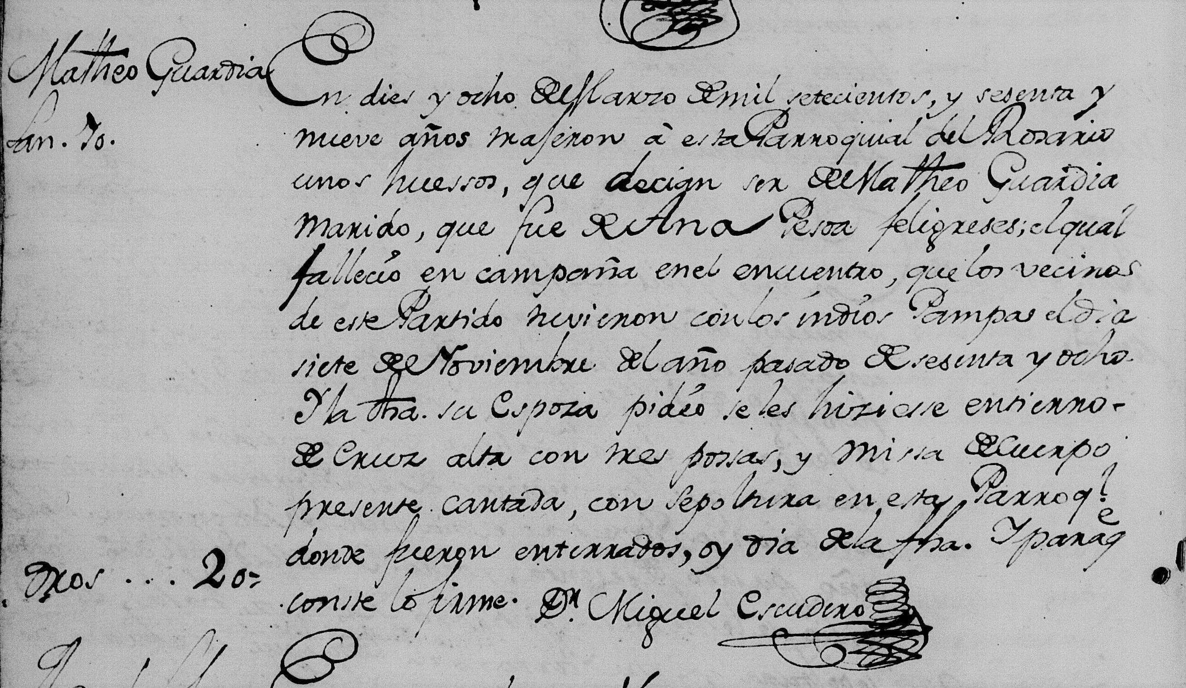 acta de defunción de Mateo Guardia, fallecido en ocasión de las incursiones de los Indios Pampas en el territorio de Rosario el 7 de noviembre de 1768..